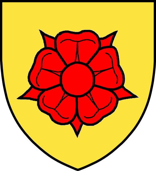 Vapensköld för adelsätten Roos af Hjelmsäter